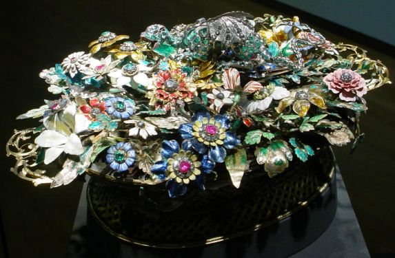 „Blumenkorb“ von Dinglinger (1701). Gold, Silber, Juwelen und Email Zu den Glanzstücken gehören ein mit Email und Edelstein besetzter Rosenkranzbehälter, wohl um 1700 in Süddeutschland gefertigt, und ein silbervergoldeter, mit Edelsteinen besetzter Blumenkorb, eines der wenigen nachweisbaren frühen Großwerke der Brüder Dinglinger. Der "von Gold mit schönen geschmelzten Blumen, Fliegen, und mit vielen Diamanten künstlich gemachte Korb", wie ihn Johann Melchior Dinglinger, seit 1701 Hofjuwelier in Dresden, beschreibt, war ein Geschenk, um den sächsischen Kurfürsten August I. für den Ankauf eines goldenen Kaffeeservices gnädig zu stimmen. Was gelang, wie Dinglinger notierte. "Nachdem Sr. Königl. Majt. obige spezifizierte Stücke alle besehen und allergnädigst beliebten zu behalten, haben höchst gedacht Sr. Königl. Majt. selbige insgesamt auf das genaueste und bedungen und behandelt vor: 50.000 Thlr. corrent". Das war sehr viel - und kann heute nicht wenig sein: 400.000 Pfund werden für dieses Stück aus dem Wettiner Familiensilber erwartet. ...E.B." Dieses Stück ist jetzt in Biberach an der Riß zu bewundern.